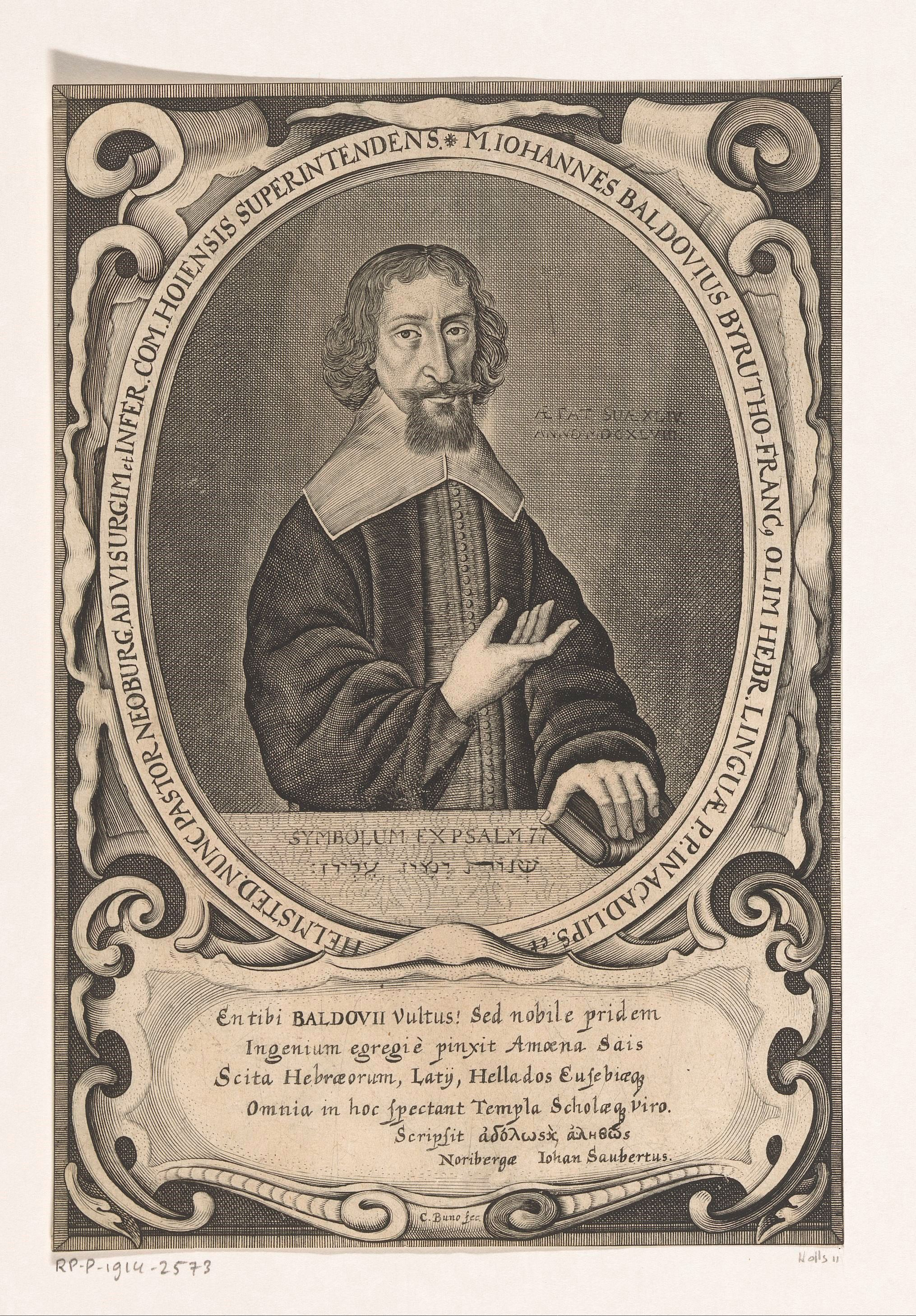 IdentificatieTitel(s): Portret van Johannes BaldoviusObjecttype: prent Objectnummer: RP-P-1914-2573Catalogusreferentie: HAB A 833Hollstein German 11Opschriften / Merken: verzamelaarsmerk, verso, gestempeld: Lugt 2228VervaardigingVervaardiger: prentmaker: Conrad Buno (vermeld op object)schrijver: Johann Saubert (I) (vermeld op object)opgedragen door: Johann Saubert (I) (vermeld op object)opgedragen aan: Johannes Baldovius (vermeld op object)Plaats vervaardiging: prentmaker: Wolfenbüttelschrijver: Neurenbergopgedragen door: NeurenbergDatering: 1648 - 1671Fysieke kenmerken: gravureMateriaal: papier Techniek: graveren (drukprocedé)Afmetingen: blad: h 204 mm (binnen de plaatrand afgesneden) × b 138 mm (binnen de plaatrand afgesneden)OnderwerpWat: historical personsbookWie: Johannes BaldoviusVerwerving en rechtenVerwerving: aankoop 1905Copyright: Publiek domein